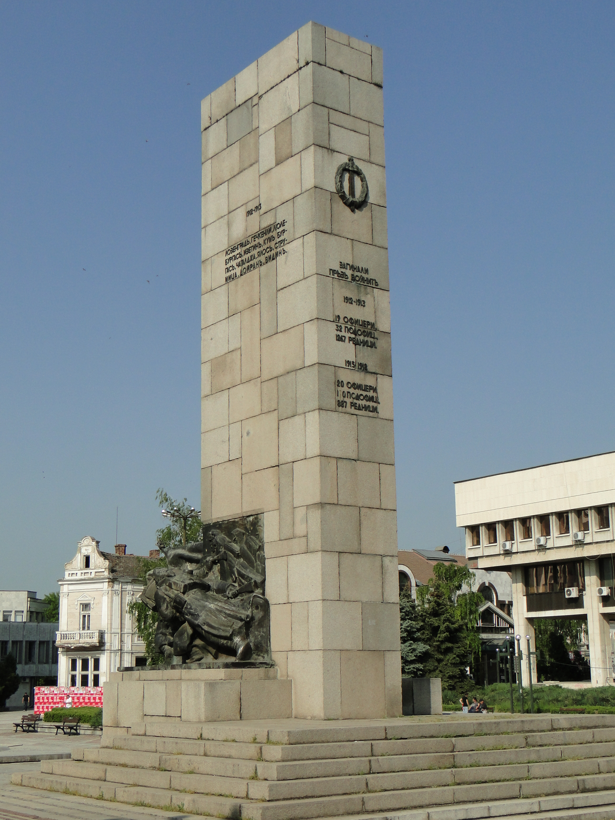 Видин, май 2013